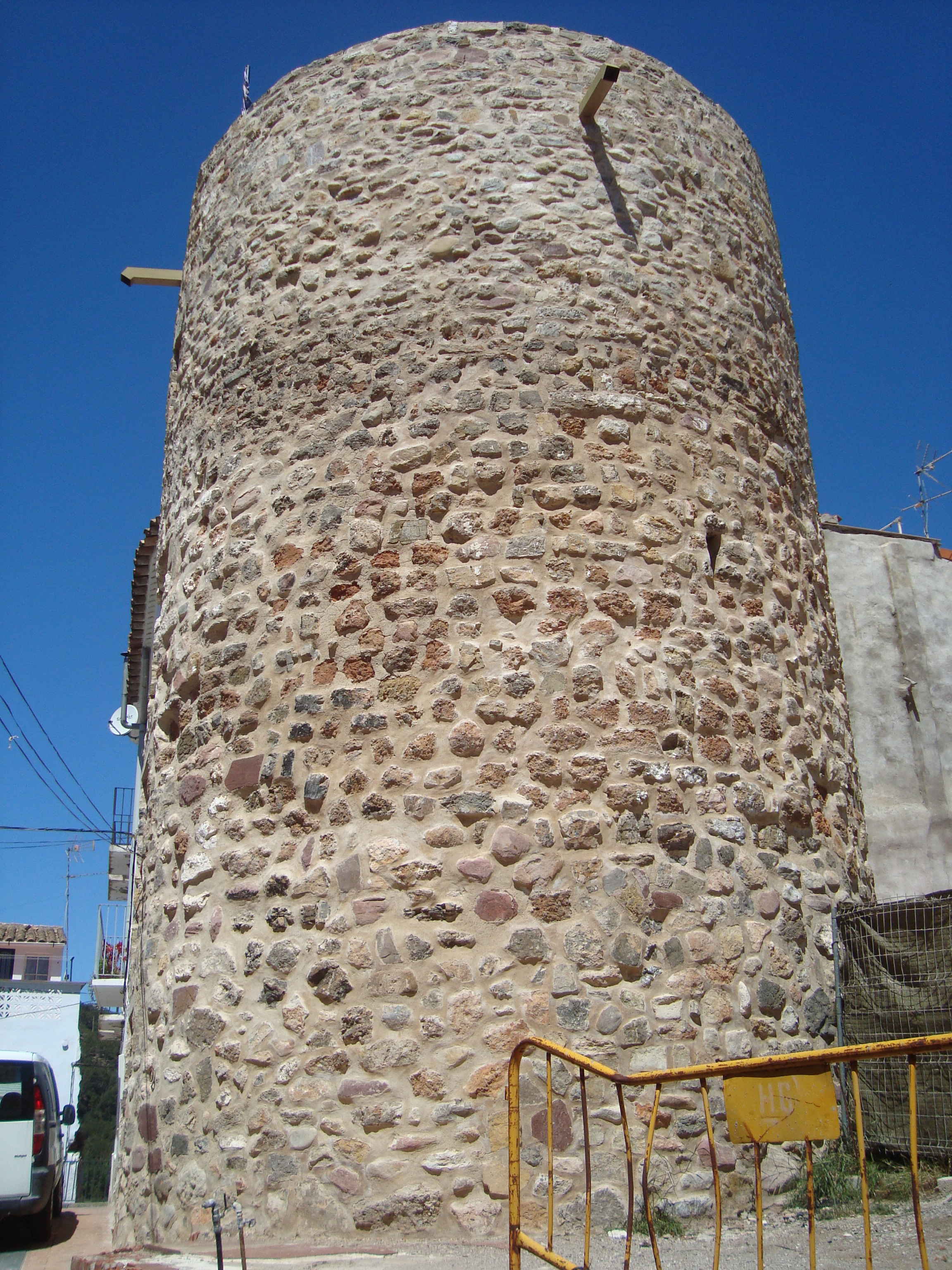 Torre de Chiva (Torre-xiva